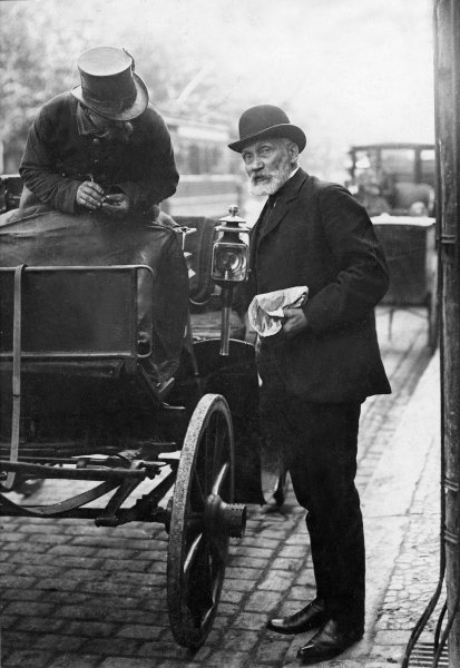 Wilhelm Voigt (Hauptmann von Köpenick) kurz nach seiner Haftentlassung im Jahr 1908 beim Besteigen einer Droschke